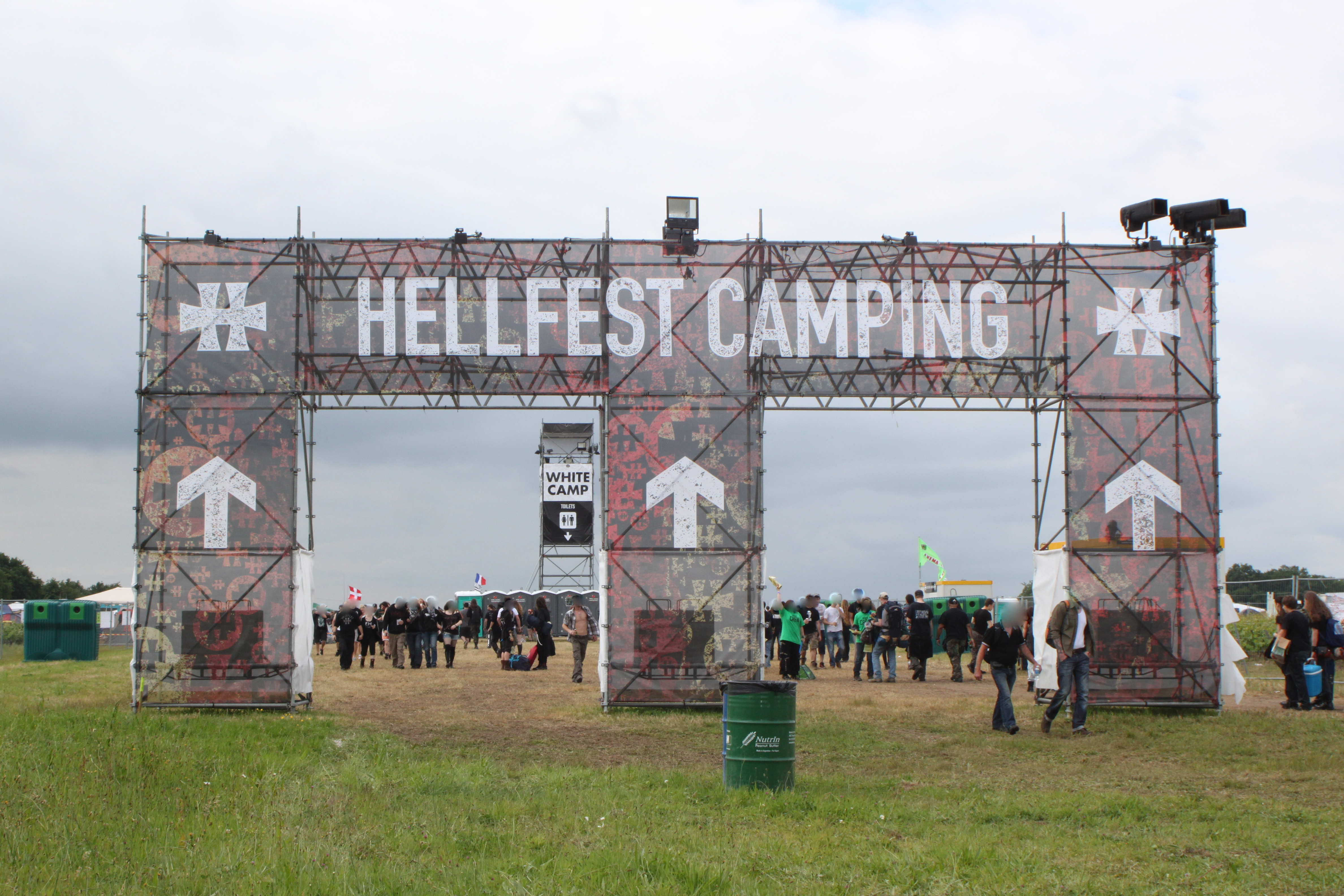 L'entrée du camping, Hellfest 2013, Fr-44-Clisson.